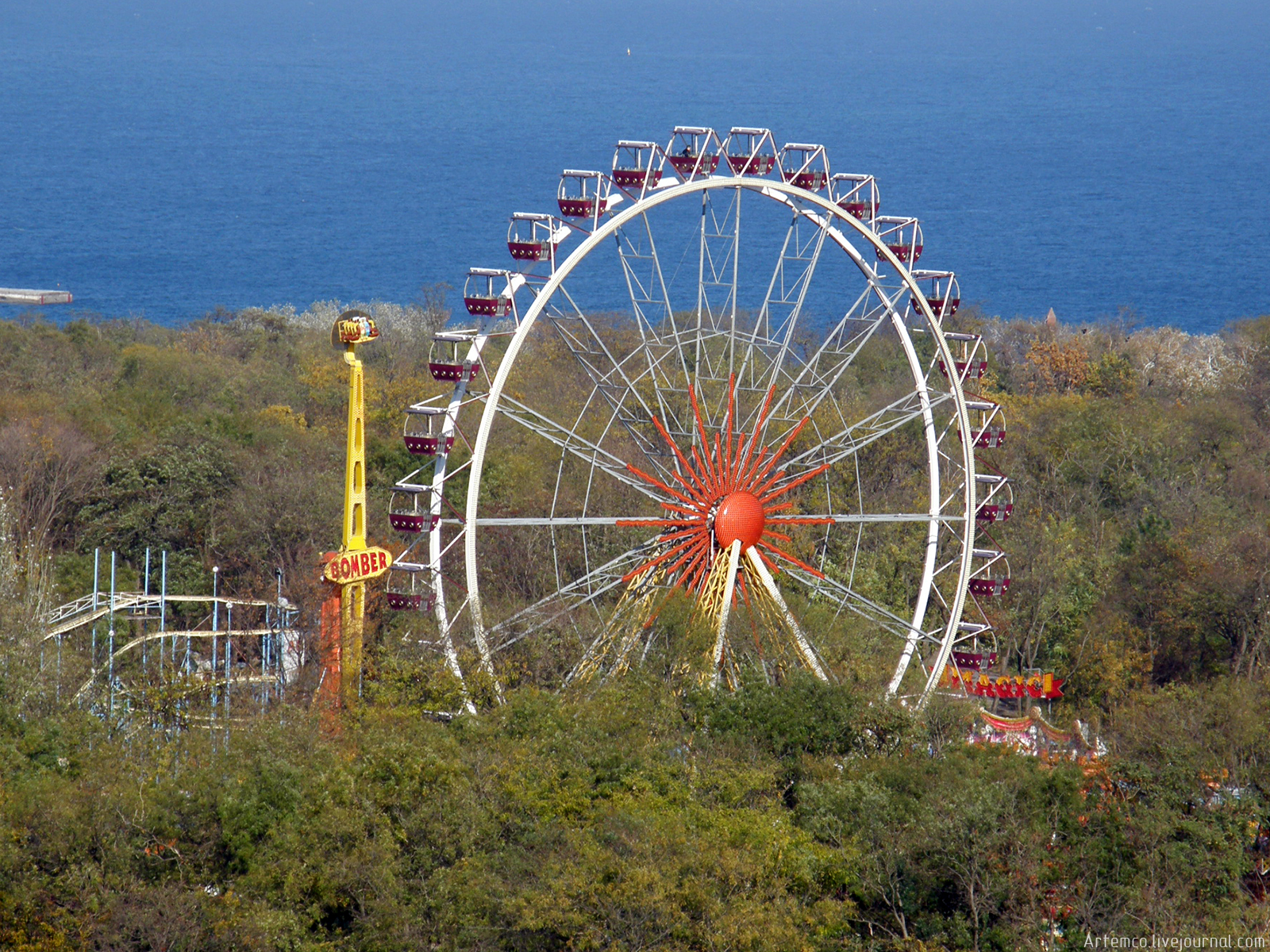 аттракционы в парке Шевченко